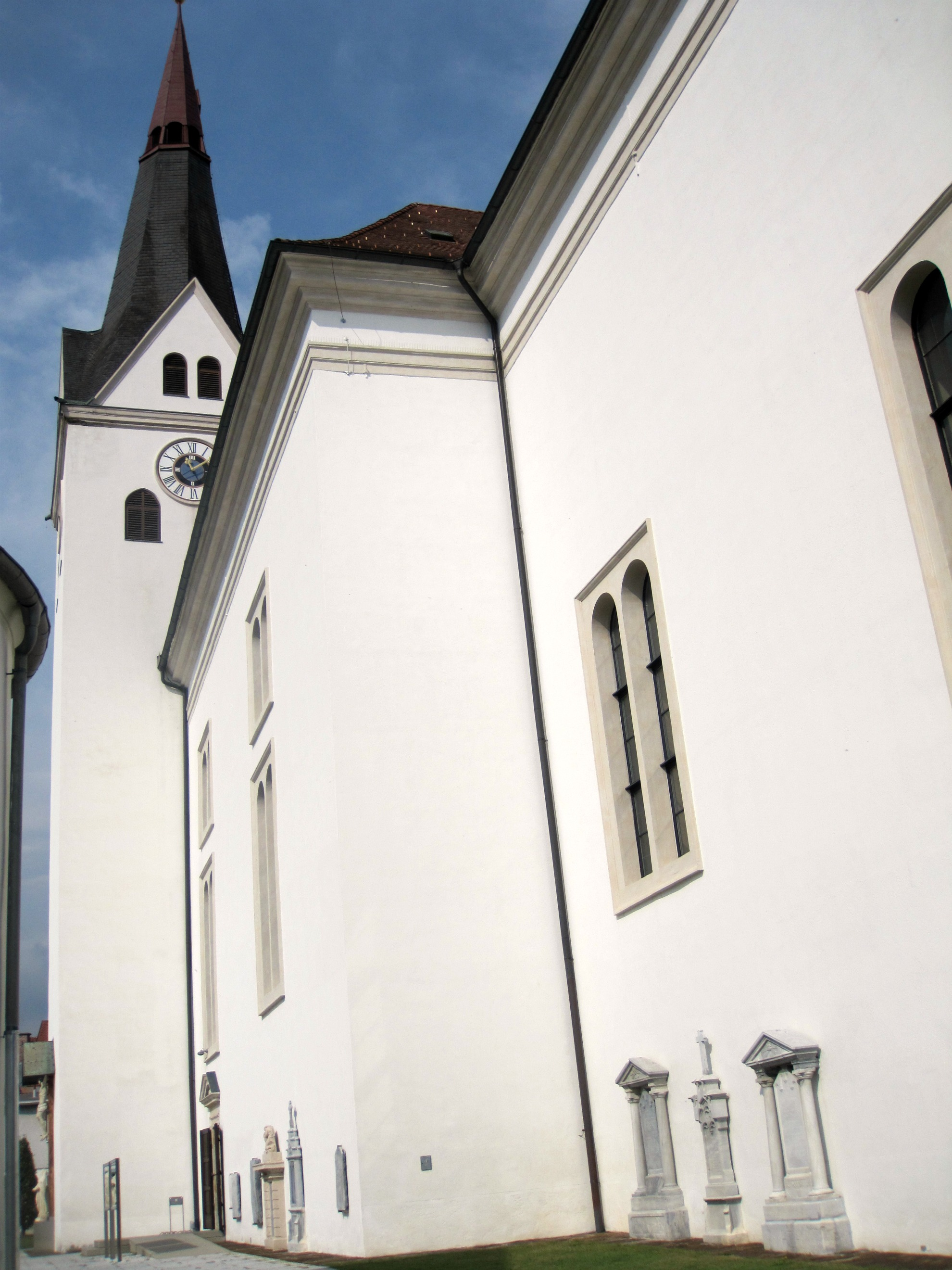 Kath. Pfarrkirche hl. Magdalena und ehem. Friedhof